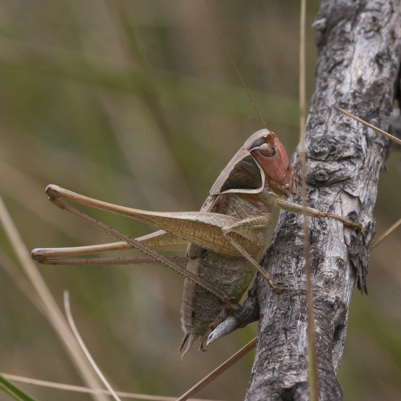 Sepiana sepium male, location: France - Provence-Alpes-Côte d'Azur